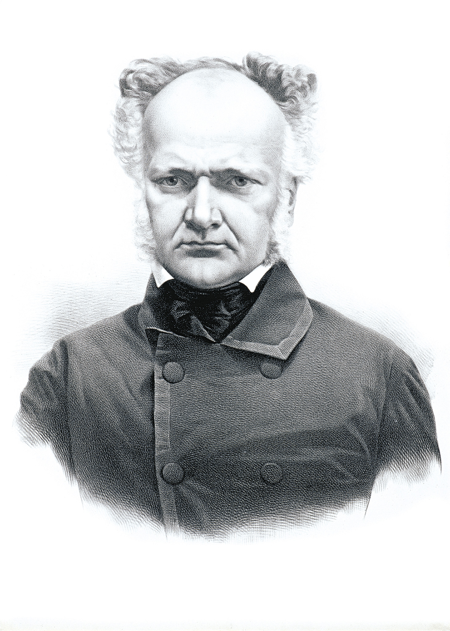 Беларуская (тарашкевіца): Партрэт Яўстаха Тышкевіча (Jaŭstach Tyškievič)